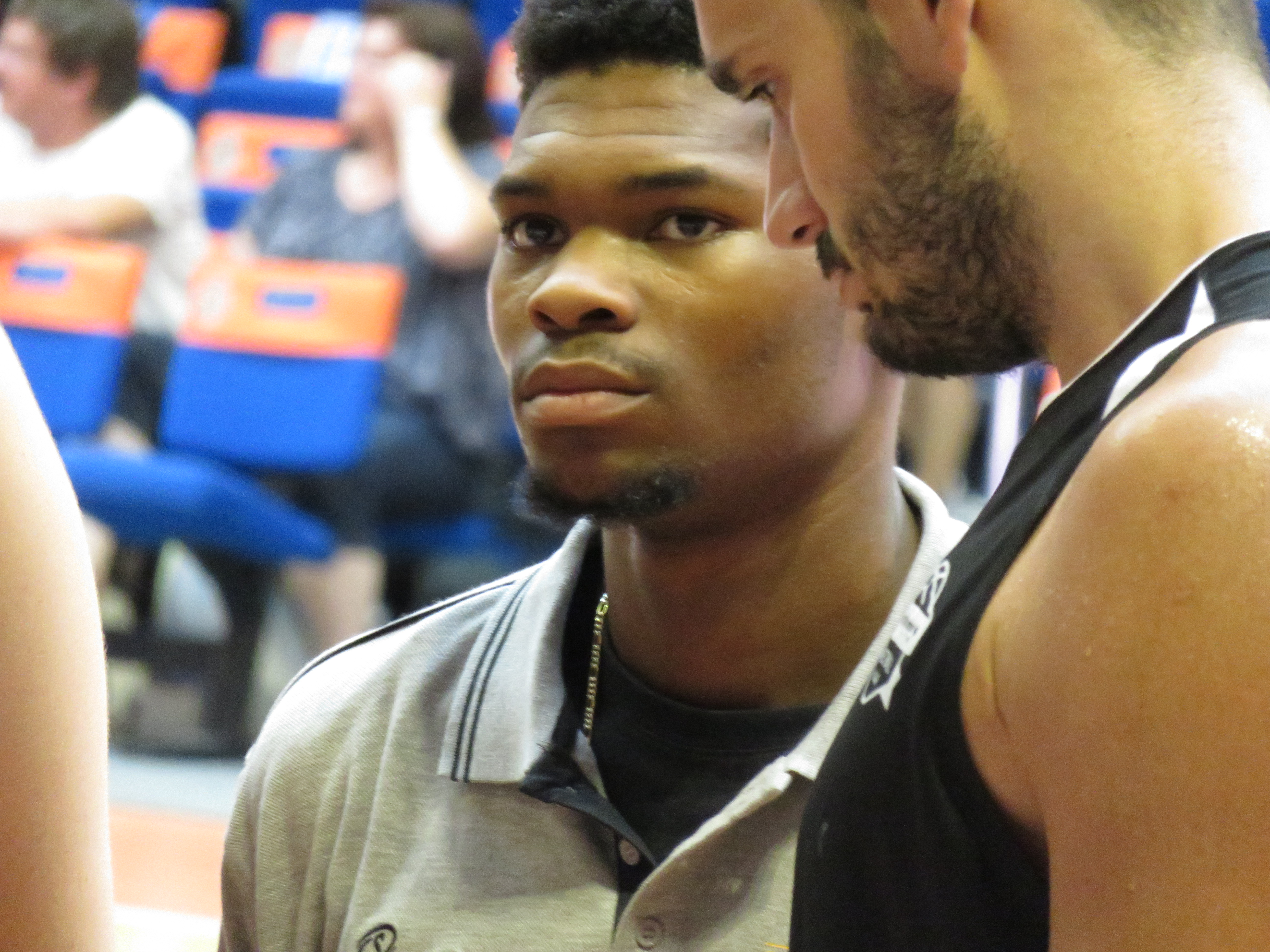 Corey Walden